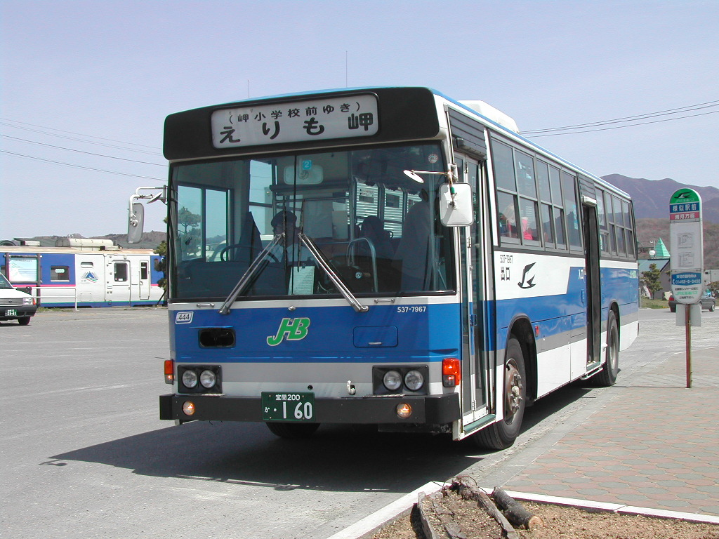 様似駅前にて撮影